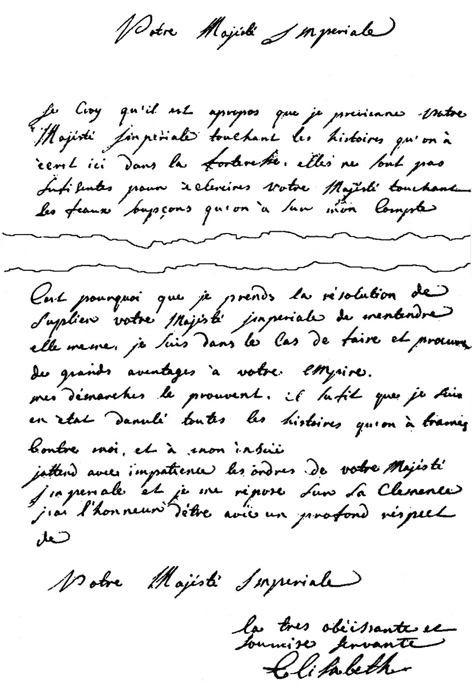 Письмо "княжны Таракановой" Екатерине II из Петропавловской крепости